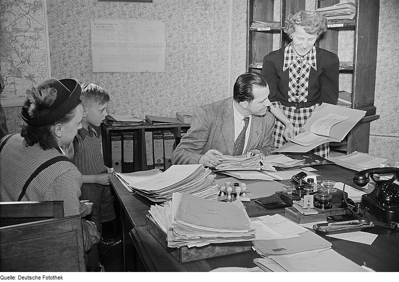 Original image description from the Deutsche Fotothek Mutter mit Kind auf dem Wohnungsamt